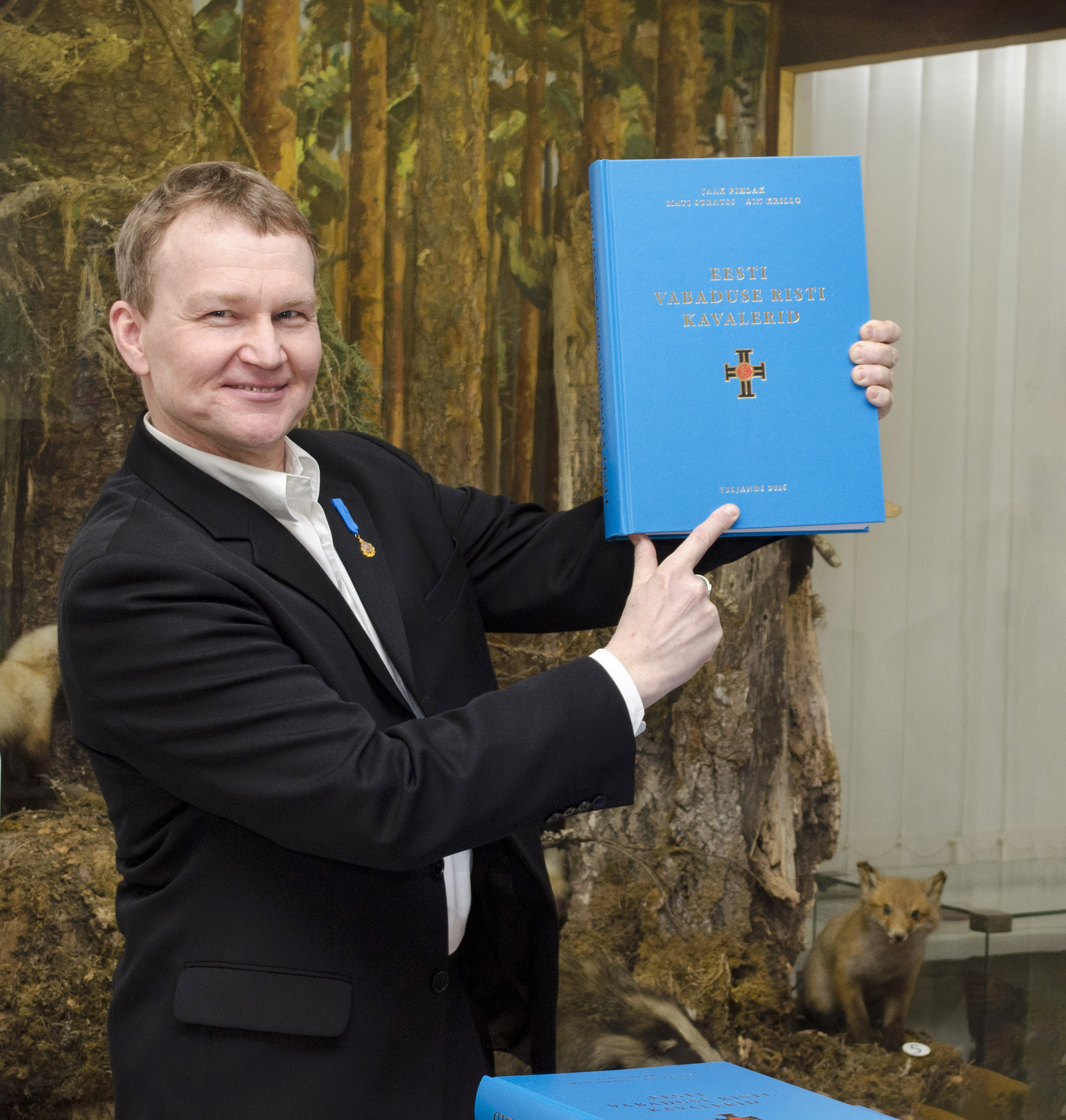 Jaak Pihlak esitleb 12. veebruaril 2016 Viljandi Muuseumis teatmeteost "Eesti Vabaduse Risti kavalerid".